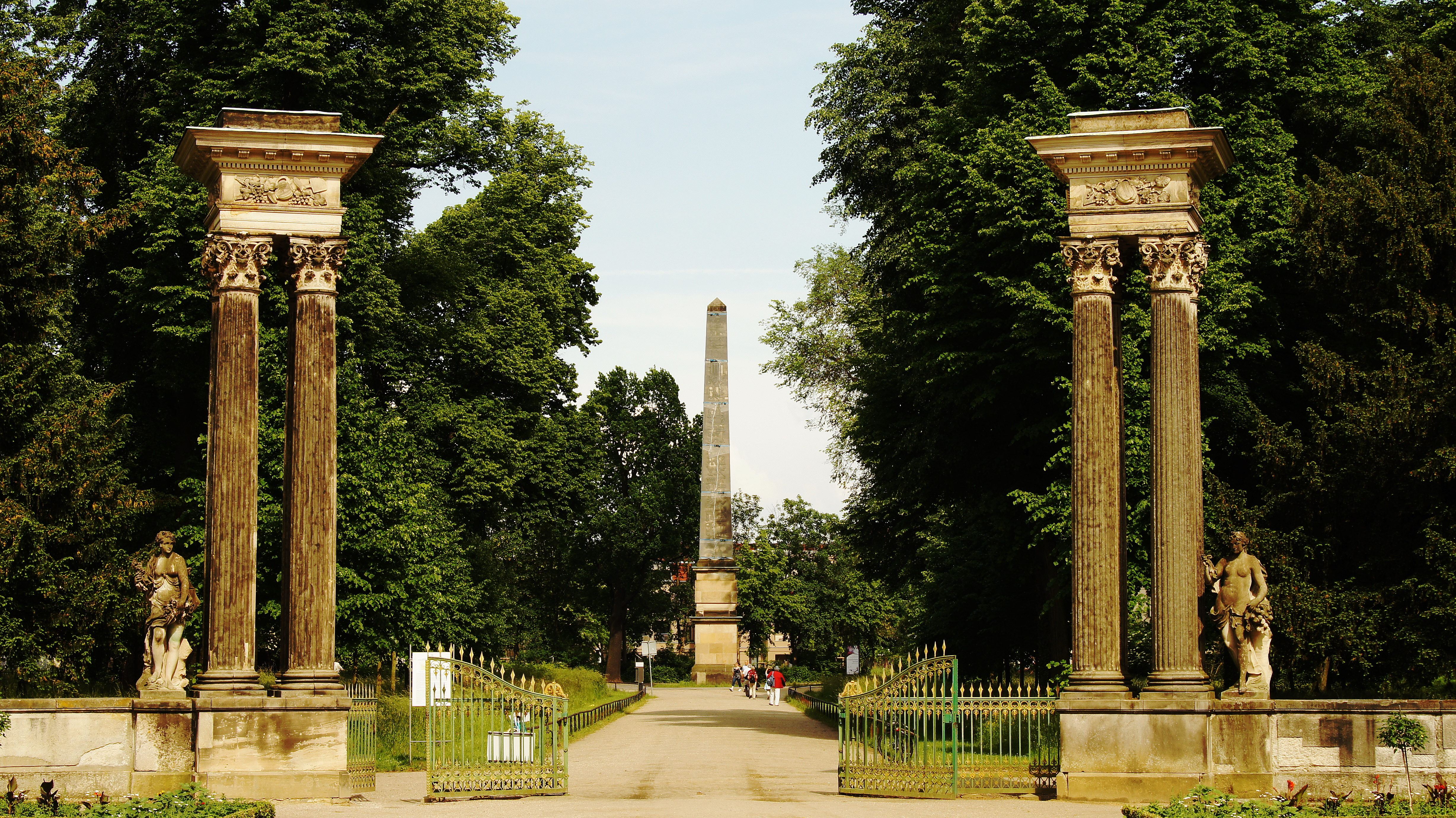 Obelisk - Park Sanssouci - Potsdam